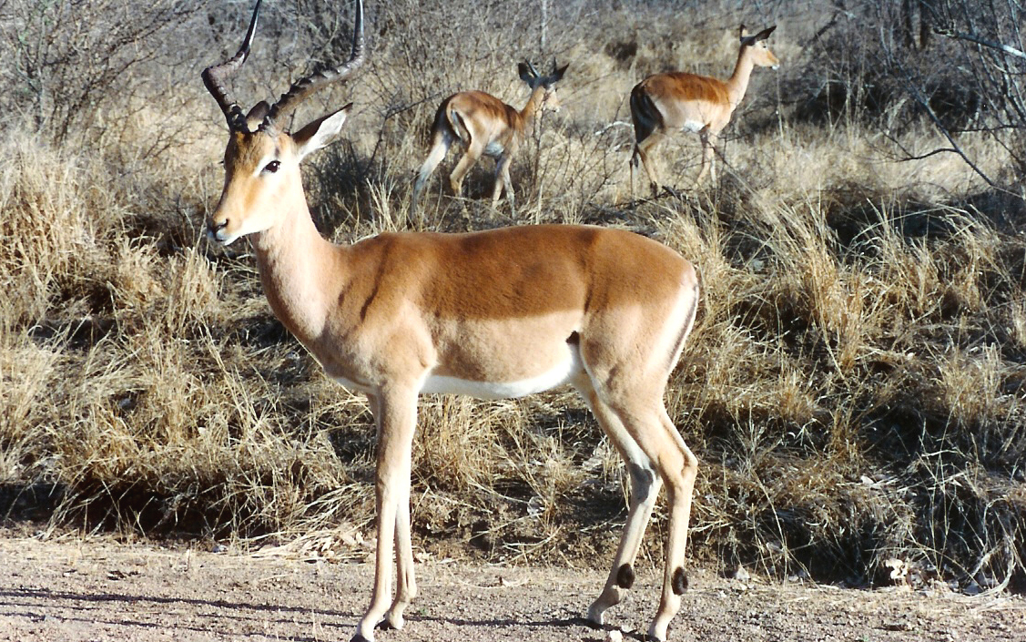 Impala am Krügerpark